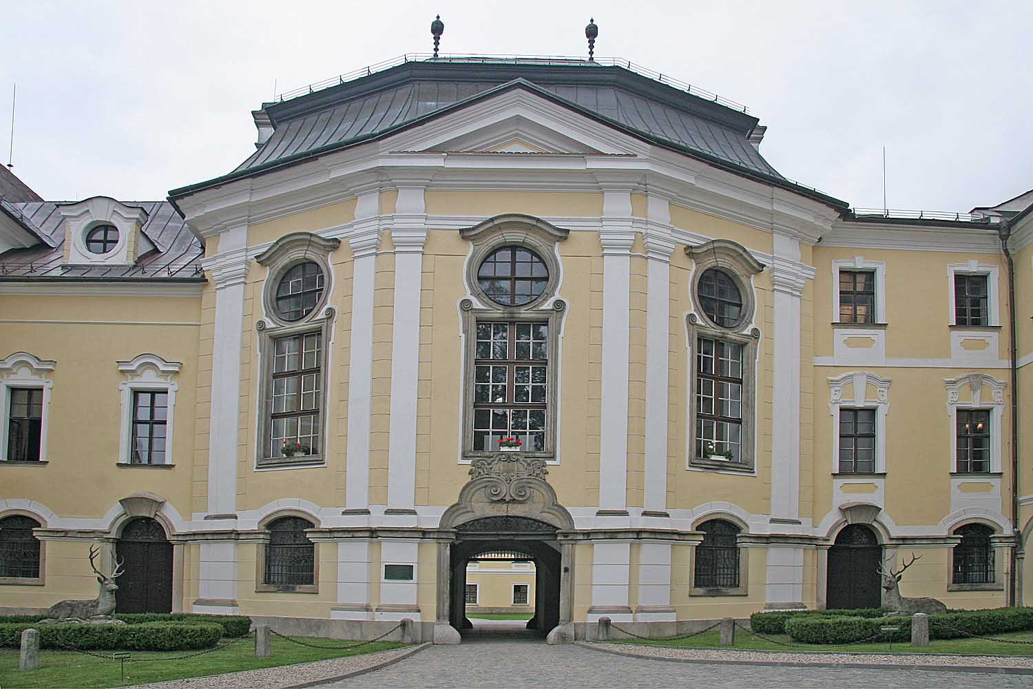 Prelatura cisterciáckého kláštera ve Žďáru nad Sázavou, district Žďár nad Sázavou, Czech Republic autor: Prazak Date: 6. 9. 2006